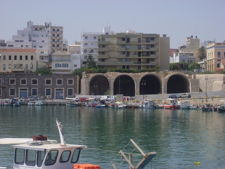 Остаци зидина из доба Млечана.